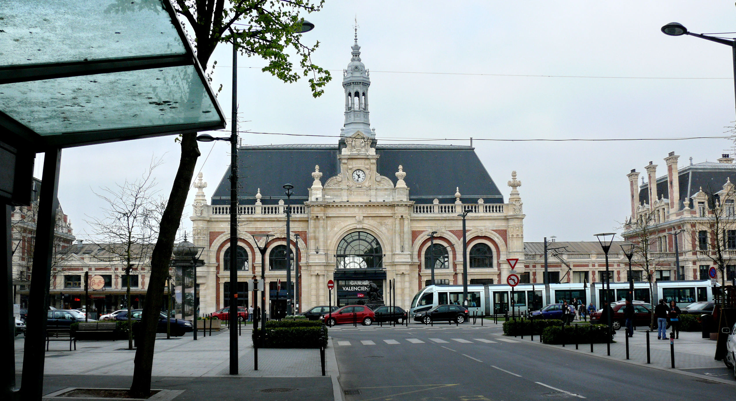 La gare de Valenciennes et le Tramway